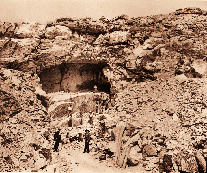 Le cave di Montalto a Retignano, fotografia del 1916